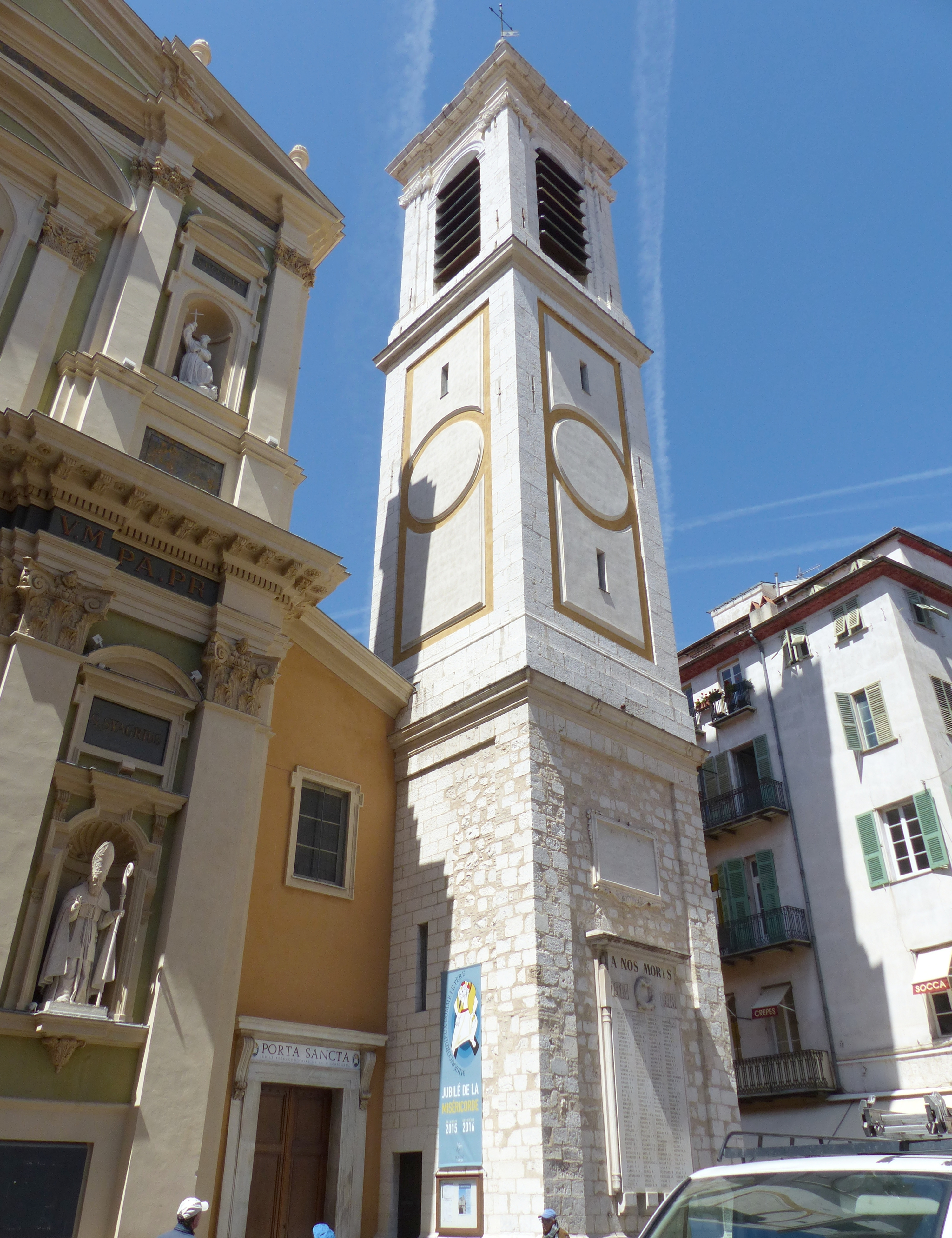 Nice (Alpes-Maritimes, France), cathédrale Ste Réparate, façade orientale, l'édifice étant "contre-orienté" (en sens inverse de la tradition : chevet à l'est, façade à l'ouest).